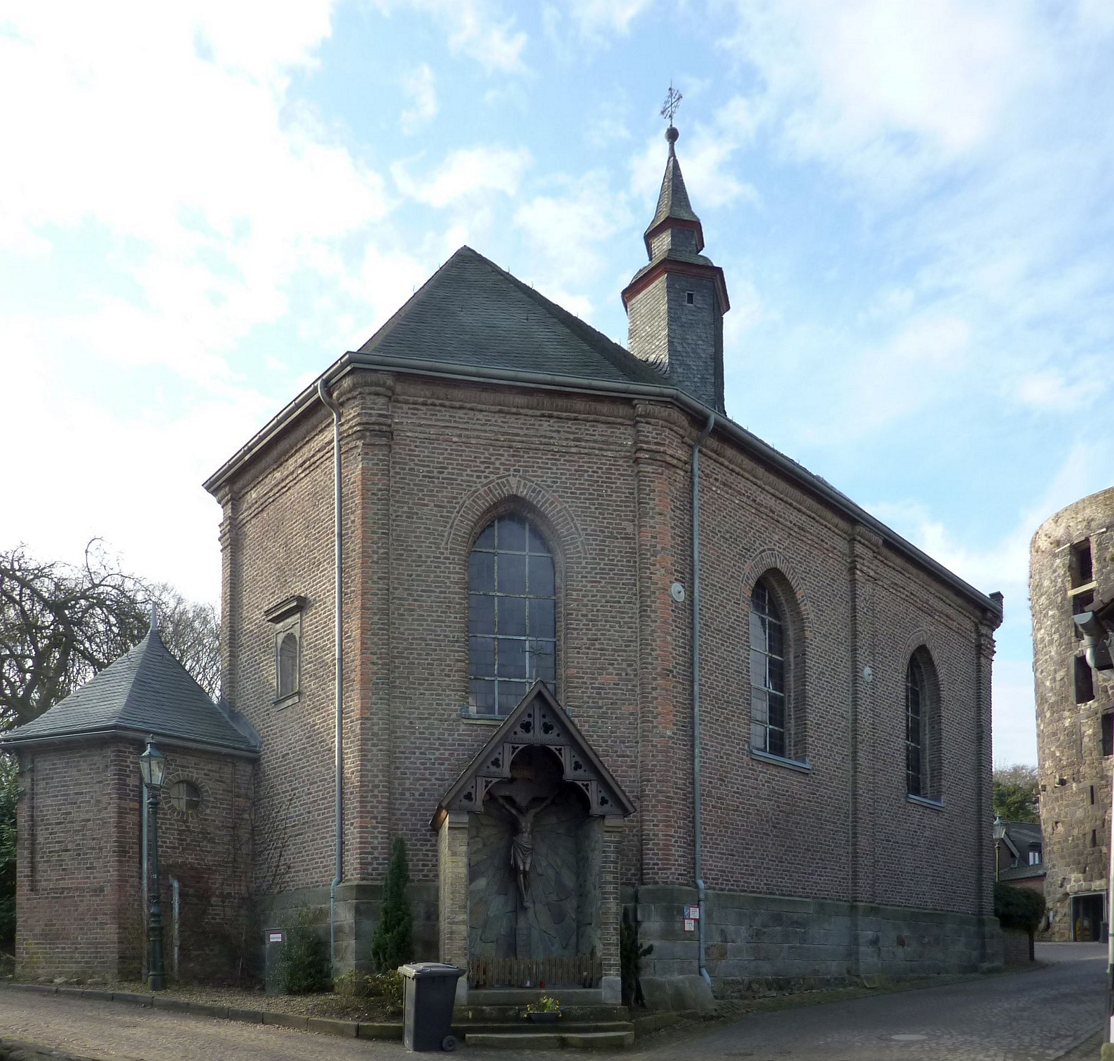 Schlosskapelle Liedberg